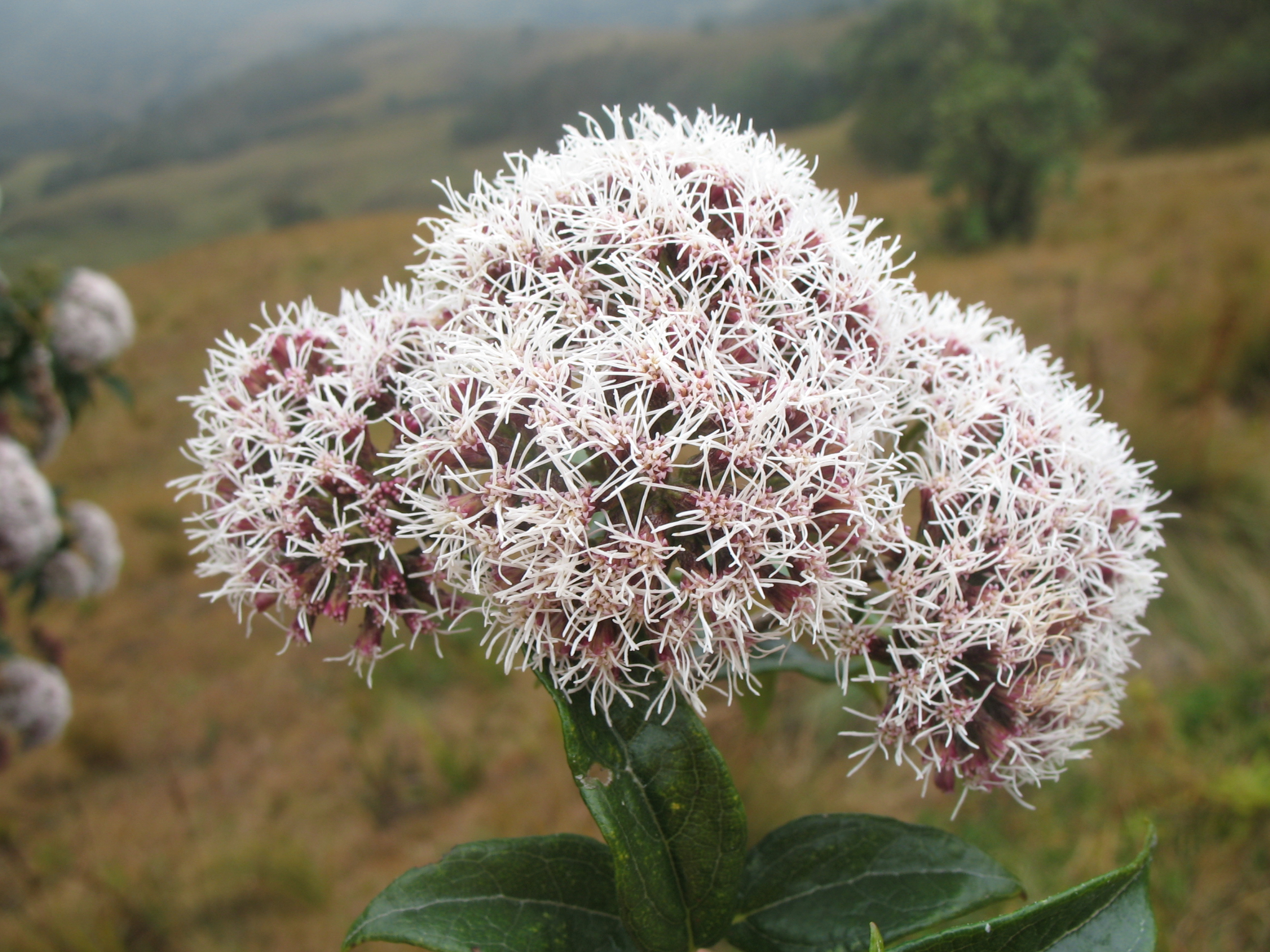 Ballidoa salicina, inflorescencia, blanco violáceas. Fruto aquenio prismático pequeño, café oscuro